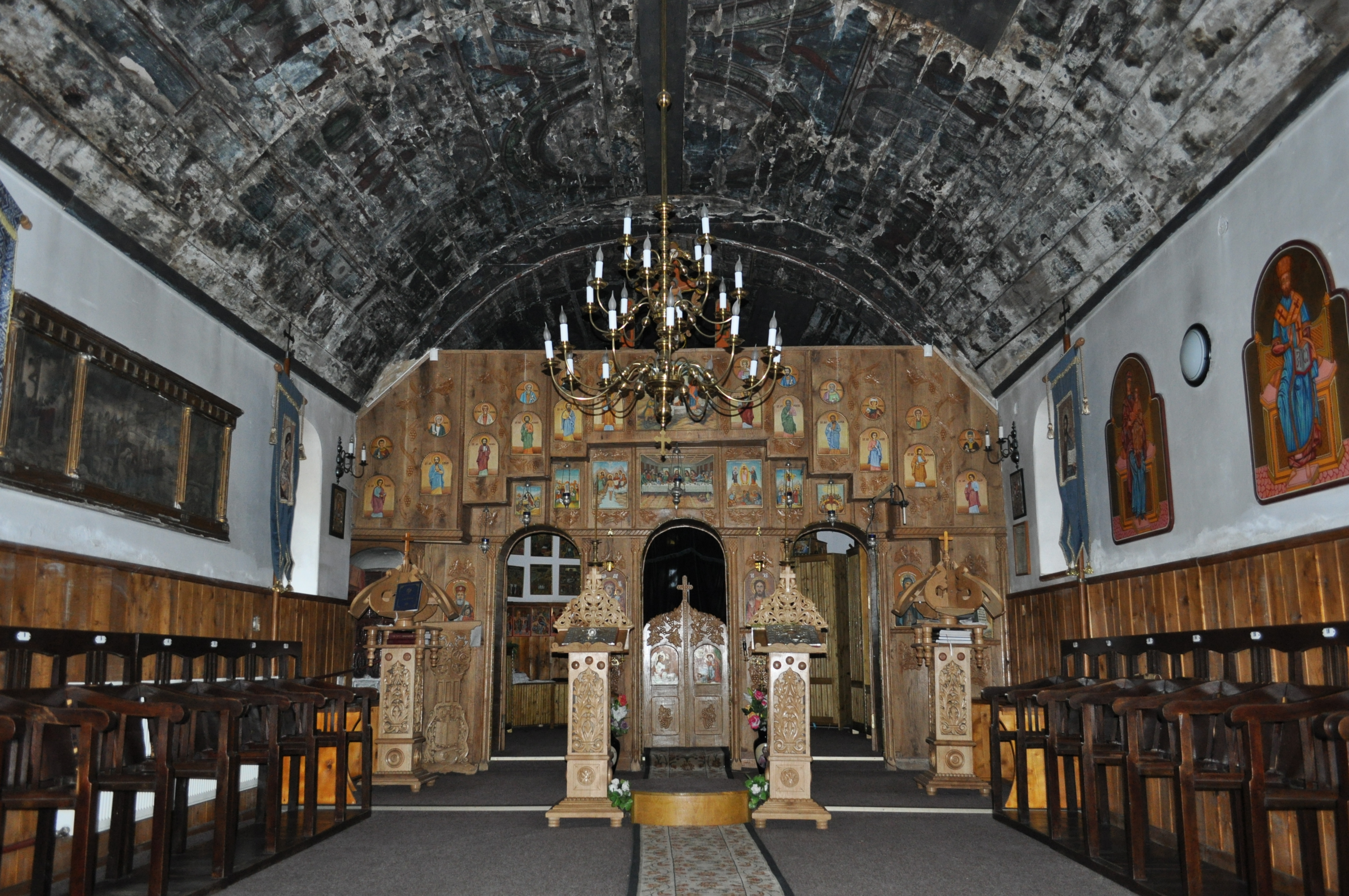 Biserica "Cuvioasa Paraschiva", sat LĂPUŞNIC; comuna DOBRA